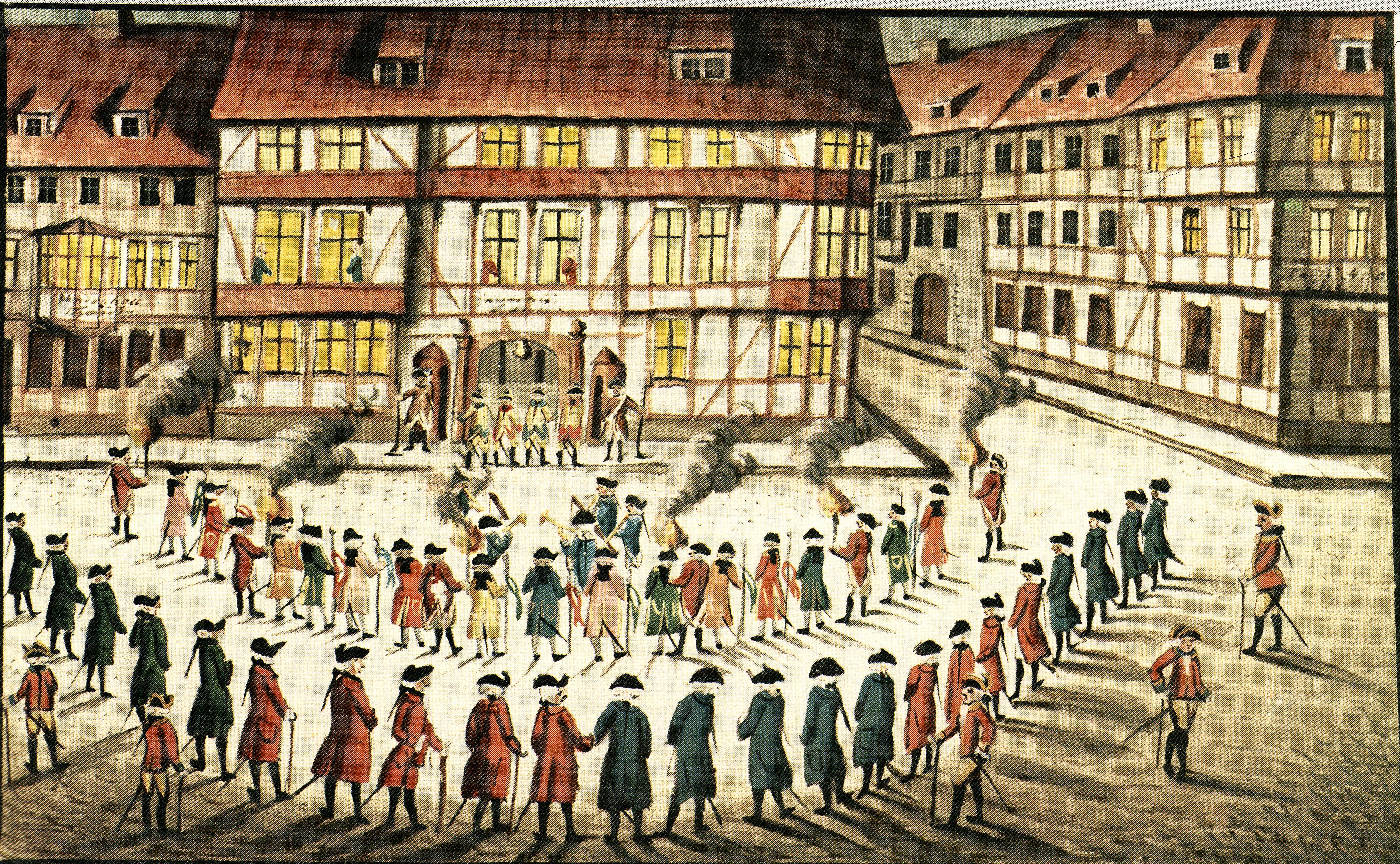 Aufzug der Göttinger Studenten vor dem von Schildwachen gesicherten Kommandantenhaus für Gerlach Adolph von Münchhausen aus Anlass der Inauguration der Universität Göttingen 1737 auf der Weender Straße 32/Barfüßerstraße. Das Kommandantenhaus was Sitz des Hannoverschen Militärs in der Stadt unter Oberst Druchtleben. Das Bild zeigt Schildwachen vor dem Haus und vier Abgesandte der Studenten vor der Tür. Weiter mit Abstand in der Mitte des Halbkreises eine Musikkapelle und Fackelträger im inneren Halbkreis. Die Studenten tragen Uniformen des Rokoko, angelehnt an Offiziersuniformen in den Farben ihrer Landsmannschaften. Für die Zeit vor 1750 sind in Göttingen Landsmannschaften der Hannoveraner (rot/blau), Braunschweiger (blau/schwarz) und Westfalen (grün/schwarz) bekannt, erst nach dem Krieg kamen weitere Landsmannschaften wie Mecklenburger und Kurländer hinzu. Die Generaladjudanten in weißen Hosen tragen eine Art Marschallstab und sichern den Aufzug. Da v. Münchhausen hannoverscher Minister war, deuten die roten Uniformen der Adjudanten auf eine Hauptverantwortung der Hanoverschen Landsmannschaft hin.